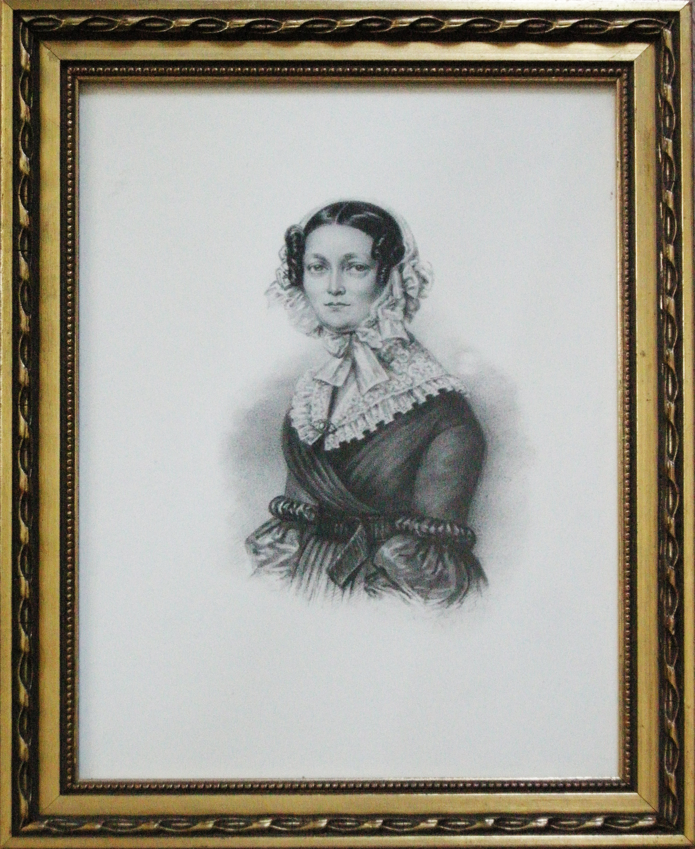 Porträtt av William Gibson's fru Anna Catharina Gibson, troligen av Maria Röhl, se